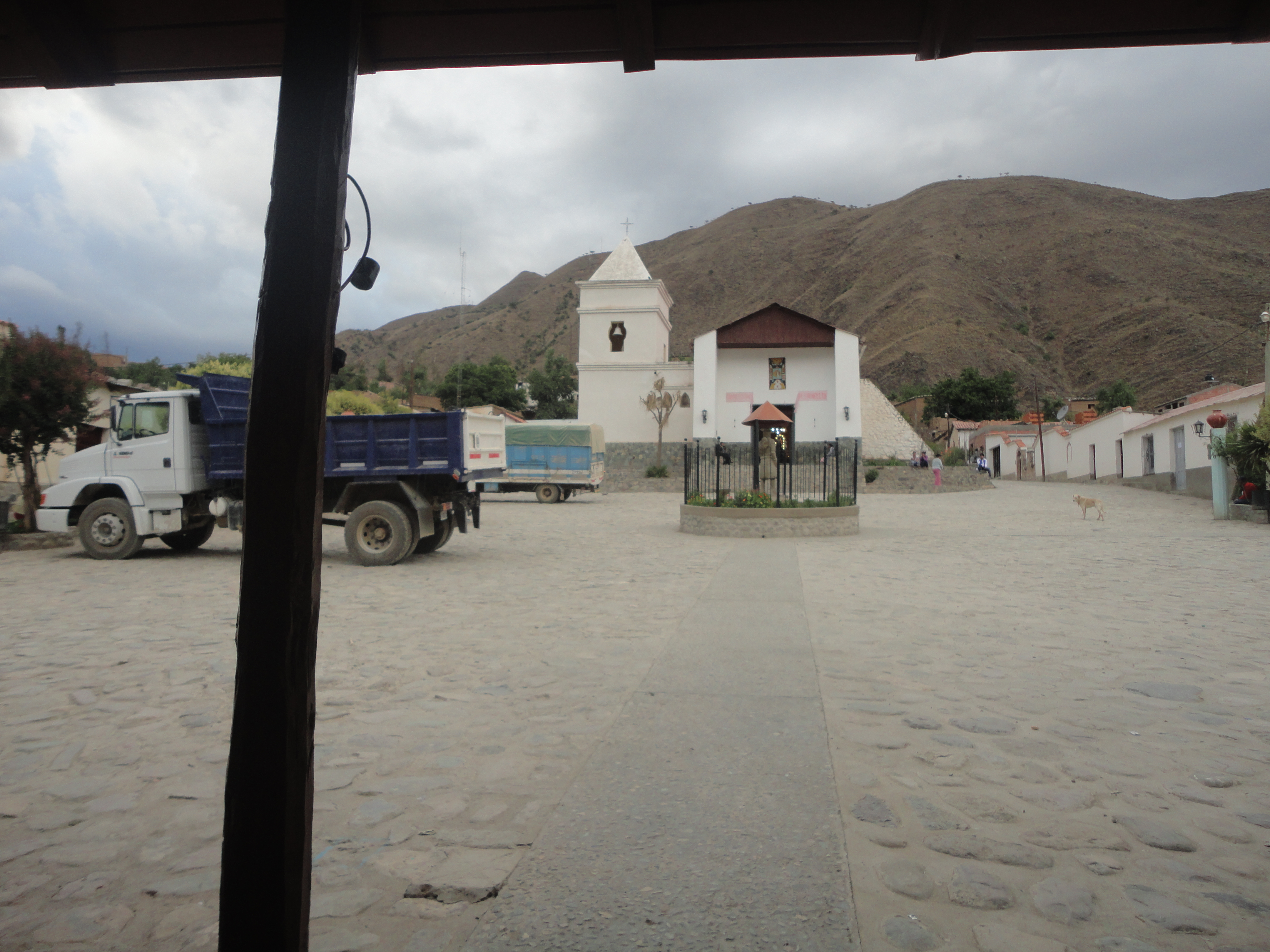 Iglesia Santa Victoria Virgen y Mártir de Jesúcristo en la localidad de Santa Victoria Oeste.